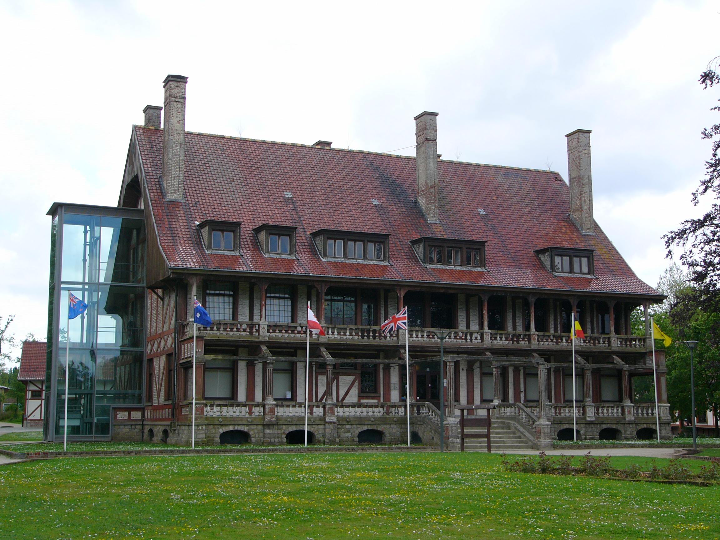 buitenkant museum